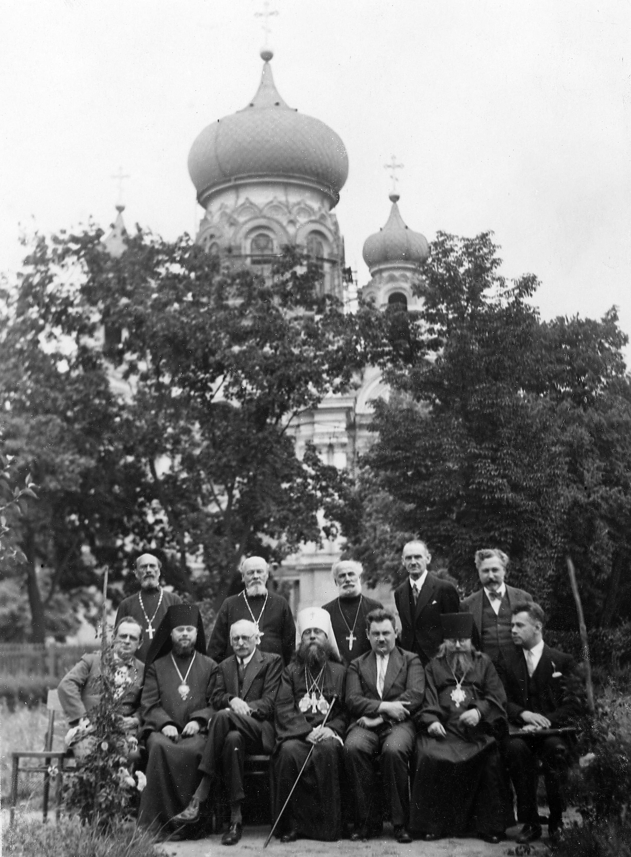 Zebranie przygotowawcze przed soborem Polskiego Autokefalicznego Kościoła Prawosławnego, do którego ostatecznie nigdy nie doszło. Ze strony Kościoła obecni biskupi Aleksander (Inoziemcow) i Aleksy (Hromadśkyj) oraz metropolita Dionizy (Waledyński), ze strony rządowej - Henryk Suchenek - Suchecki, Franciszek Salezy Potocki, Tadeusz Hołówko.